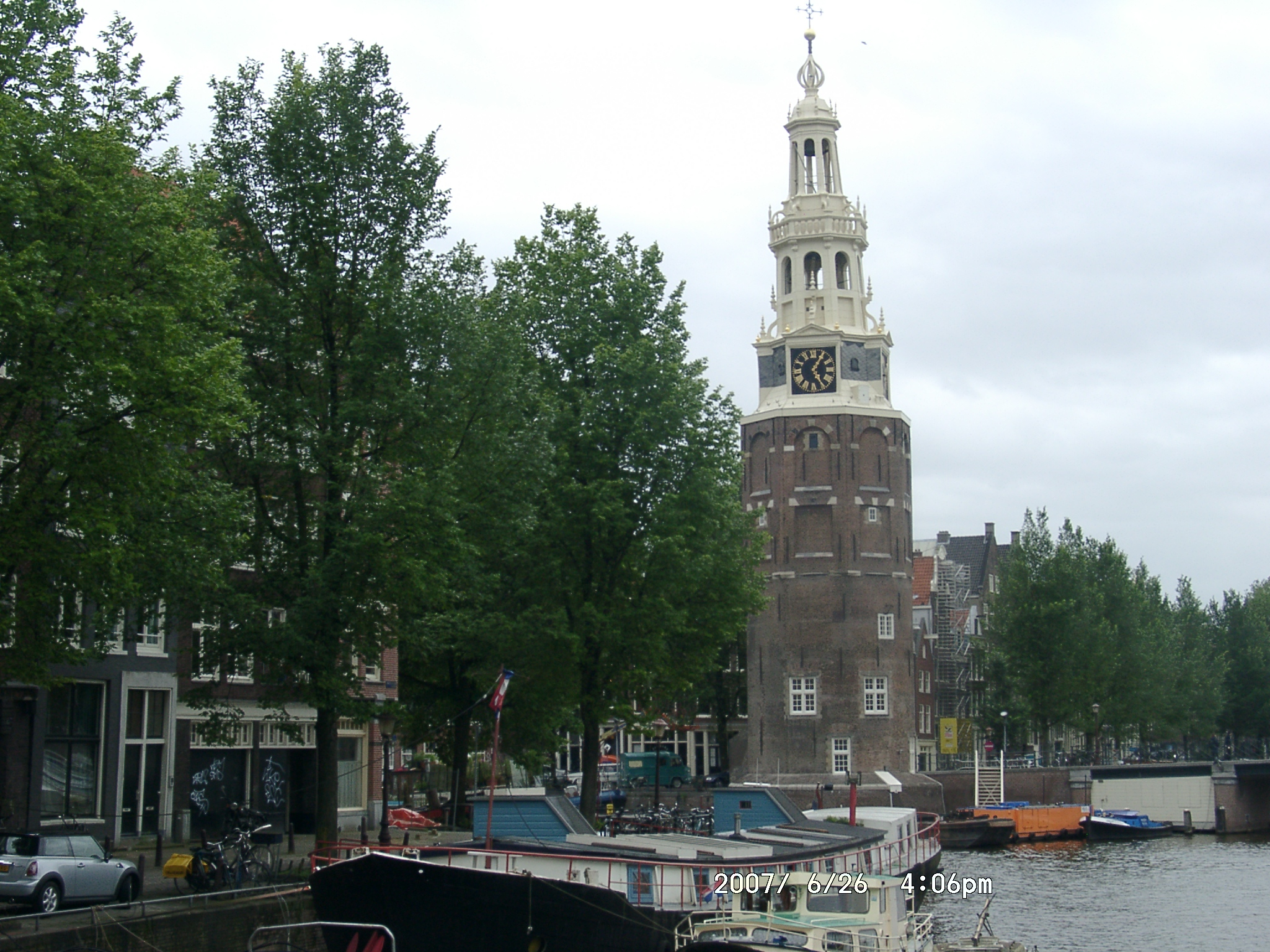 Oude Schans and Montelbaanstower in Amsterdam